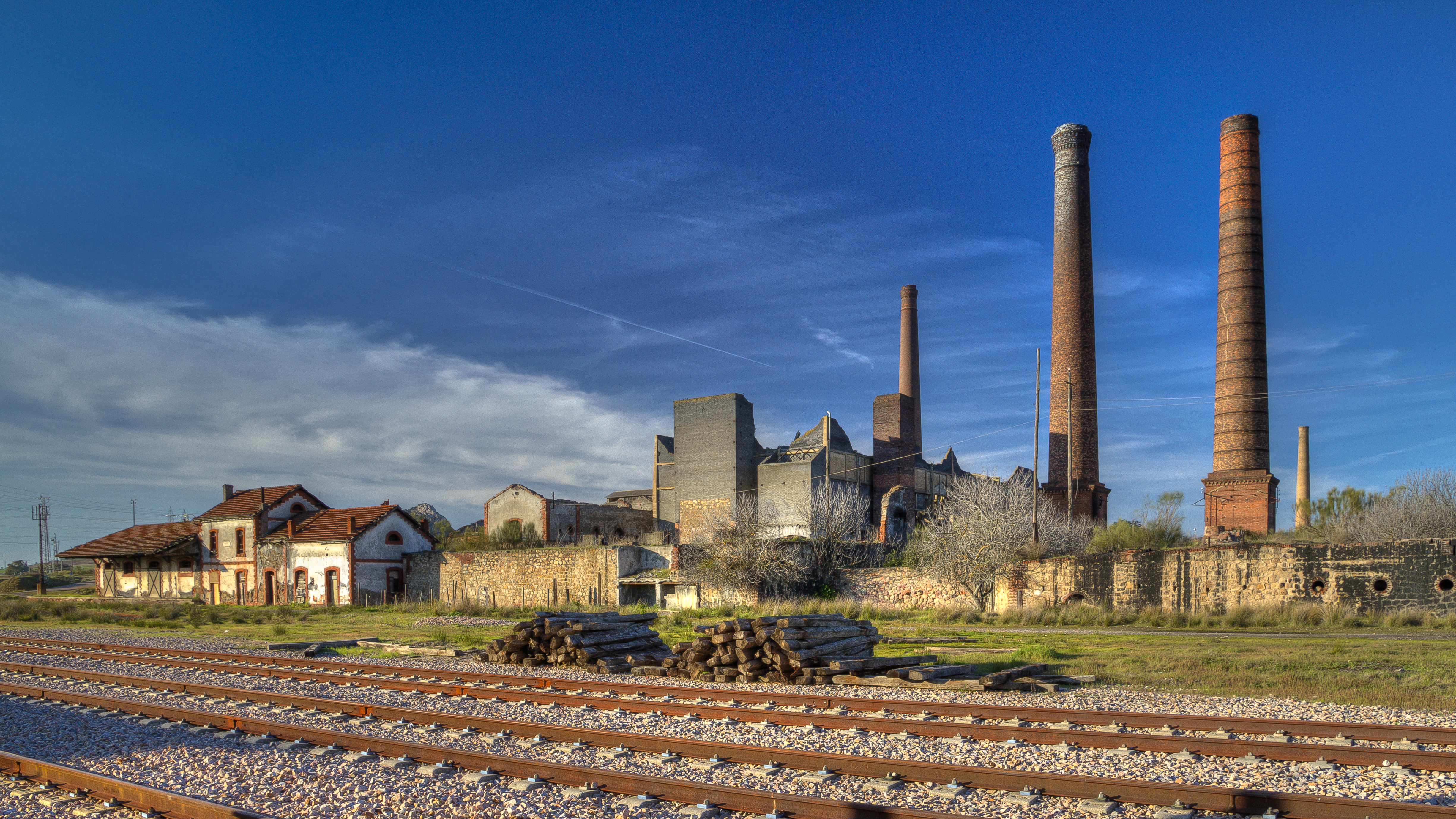 La fundición de Peñarroya Pueblonuevo y la estación de la vía estrecha